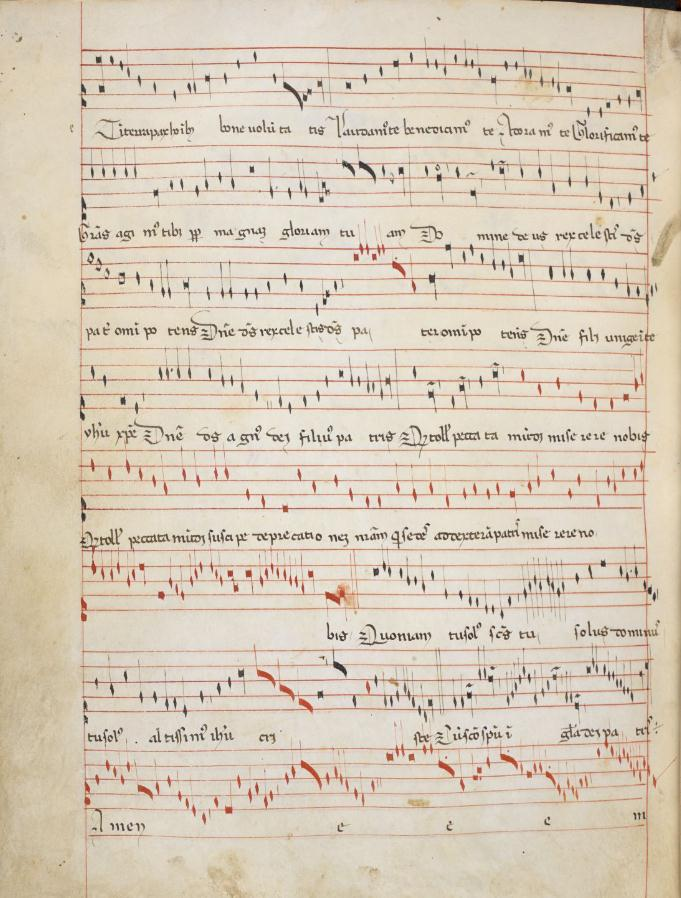 BL 29987